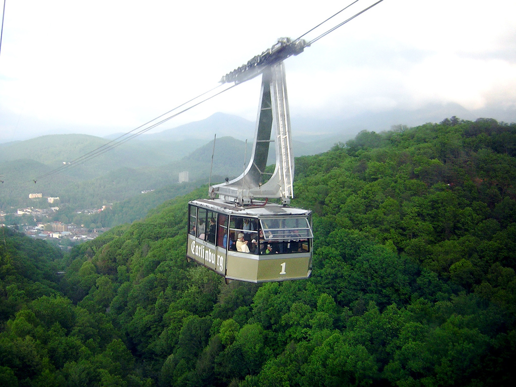 Ober Gatlinburg aerial tramway.